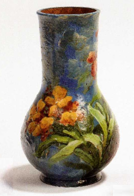 Vase à décor de barbotine de la Manufacture Eugène Schopin, Montigny-sur-Loing, France XIXe siècle